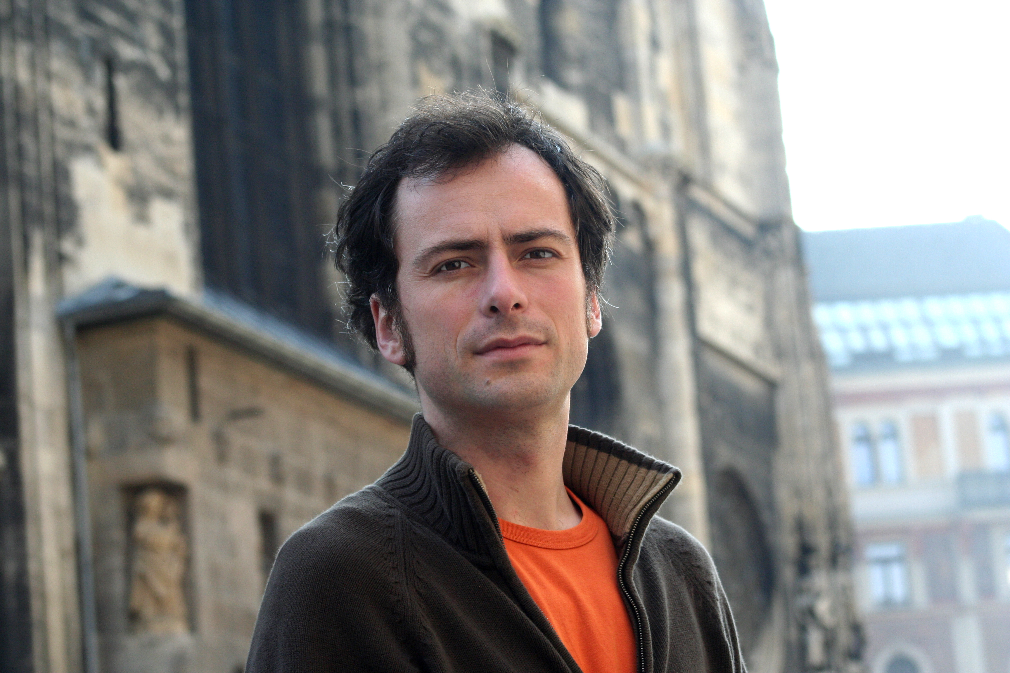 Hannes Hager in Wien, 2007